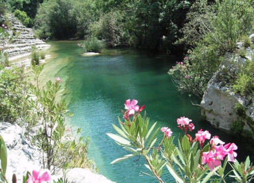 Cavagrande del Cassibile - Siracusa - Sicilia